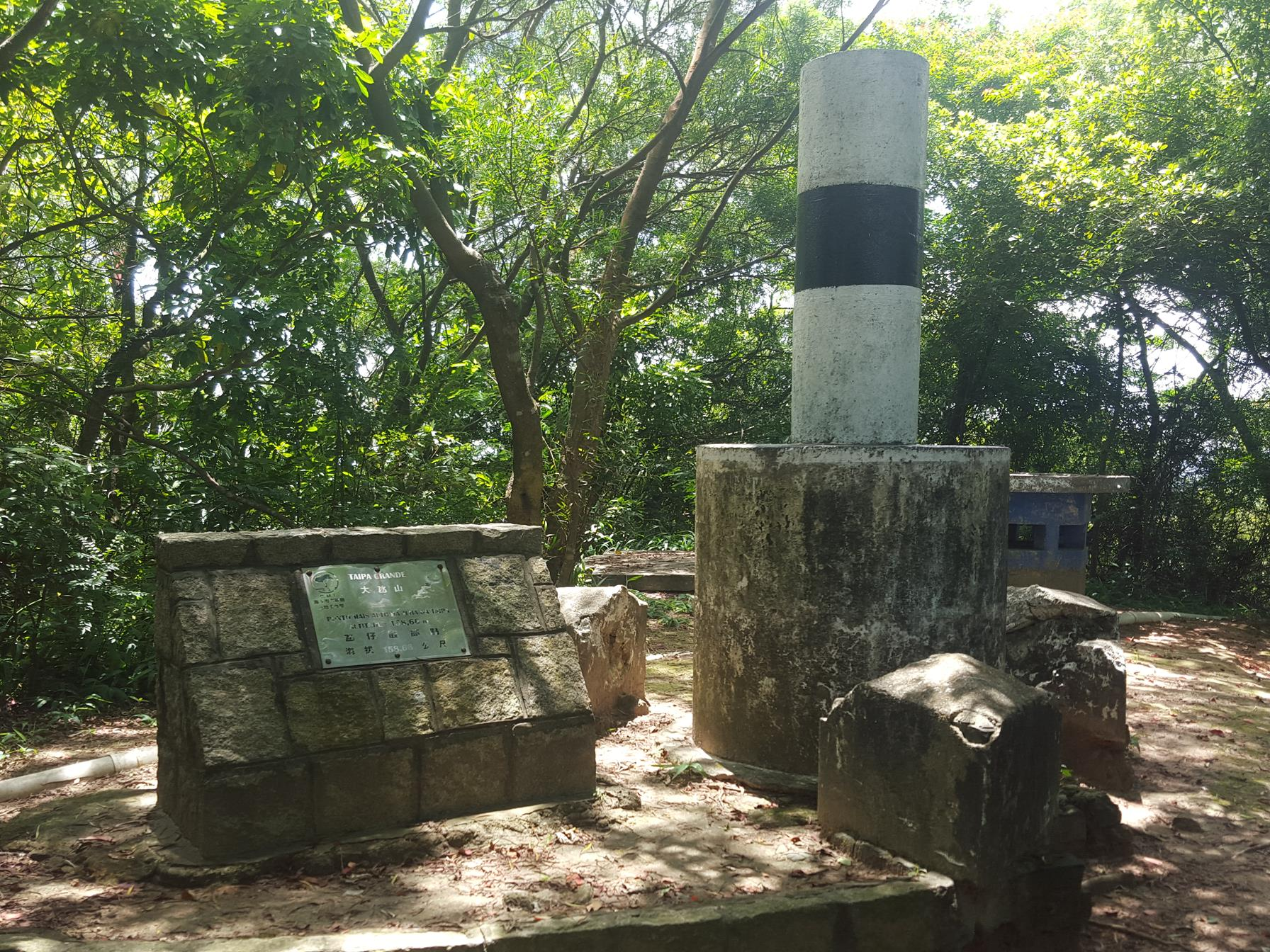 Parque Natural da Taipa Grande